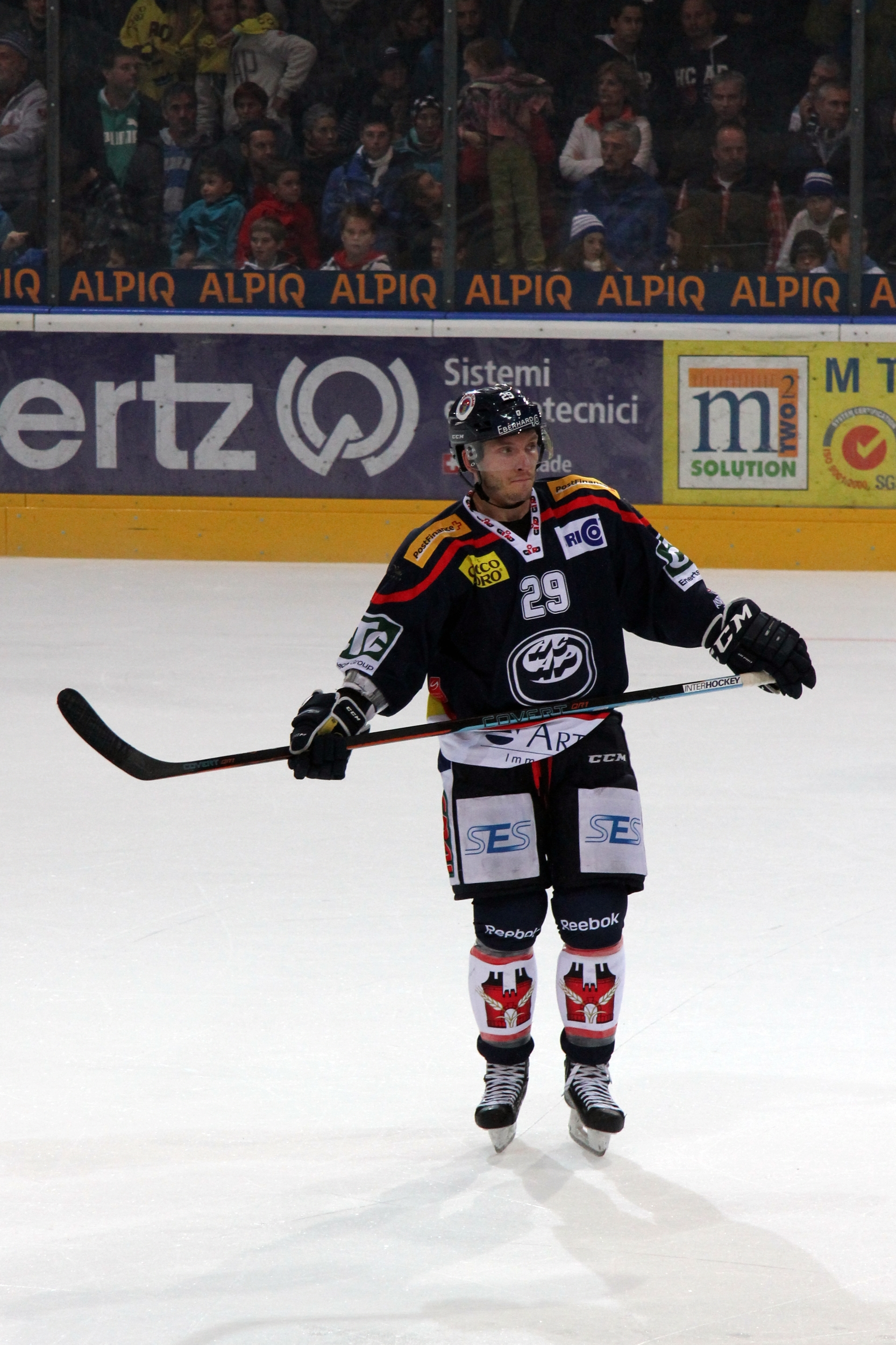 Keith Aucoin (A 29).